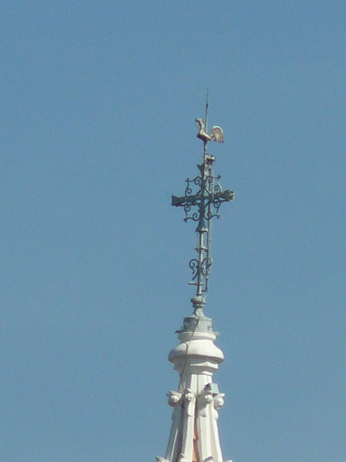 Hình tự chụp